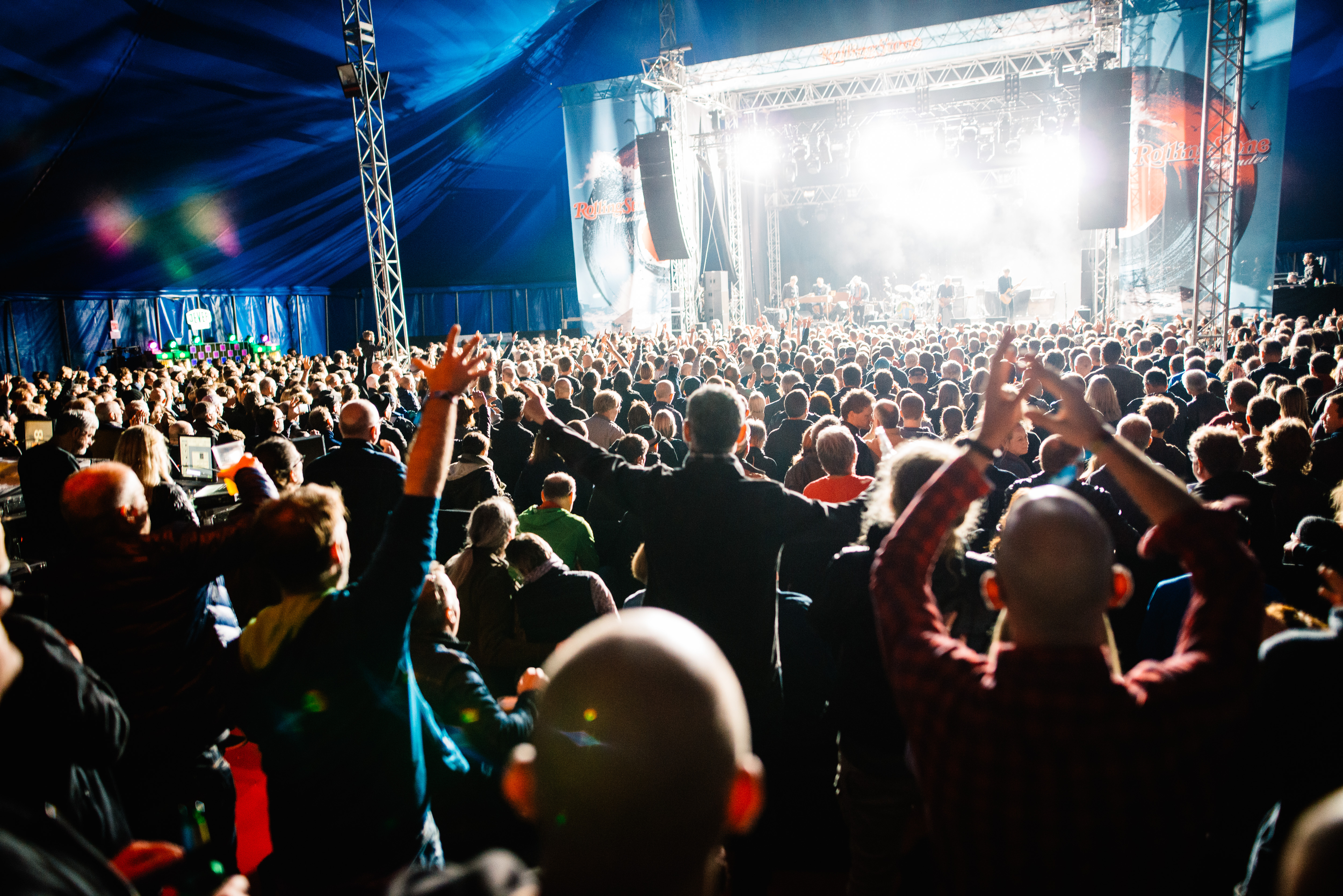 Konzert von Wilco beim Rolling Stone Weekender 2016